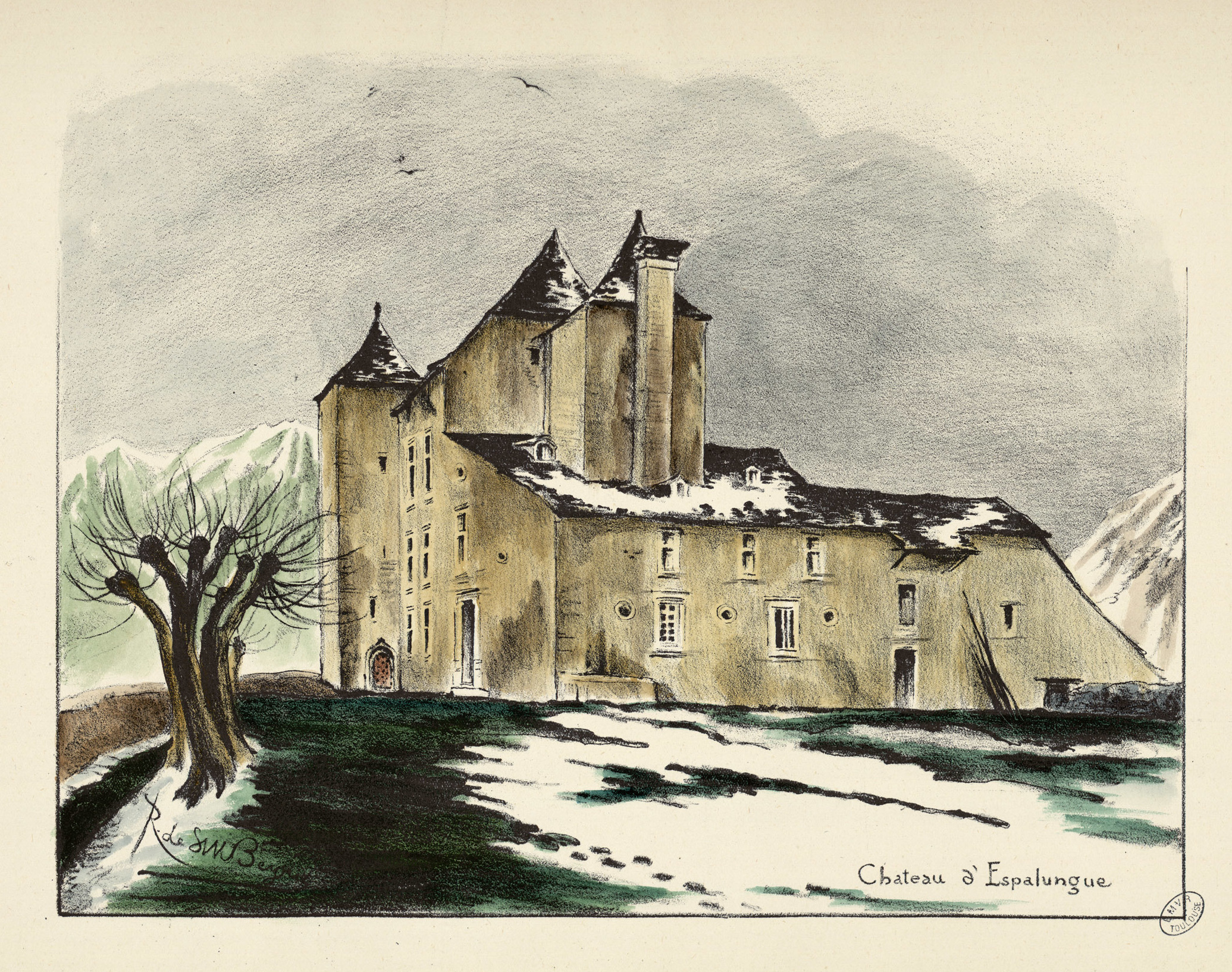 Ancely, René (1876 - 1966). Possesseur